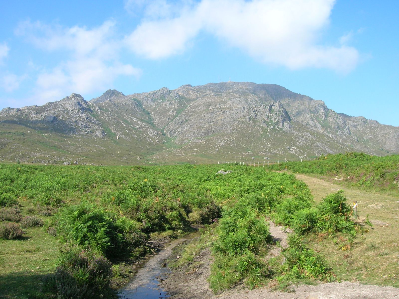 Ruta de Padrendo, Lobios. A serra de Santa Eufemia.